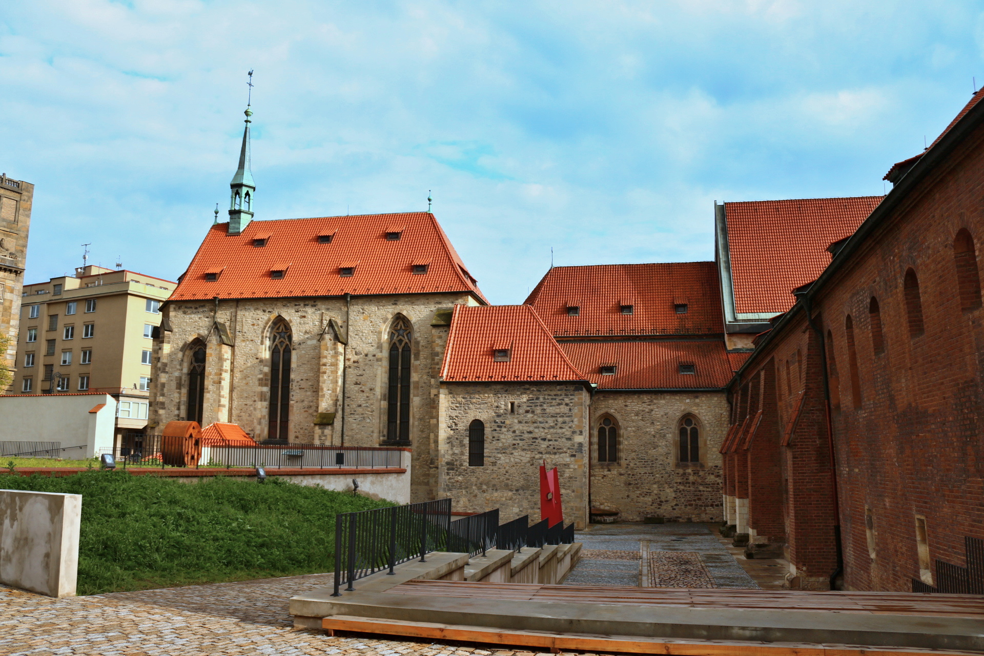 Anežský klášter